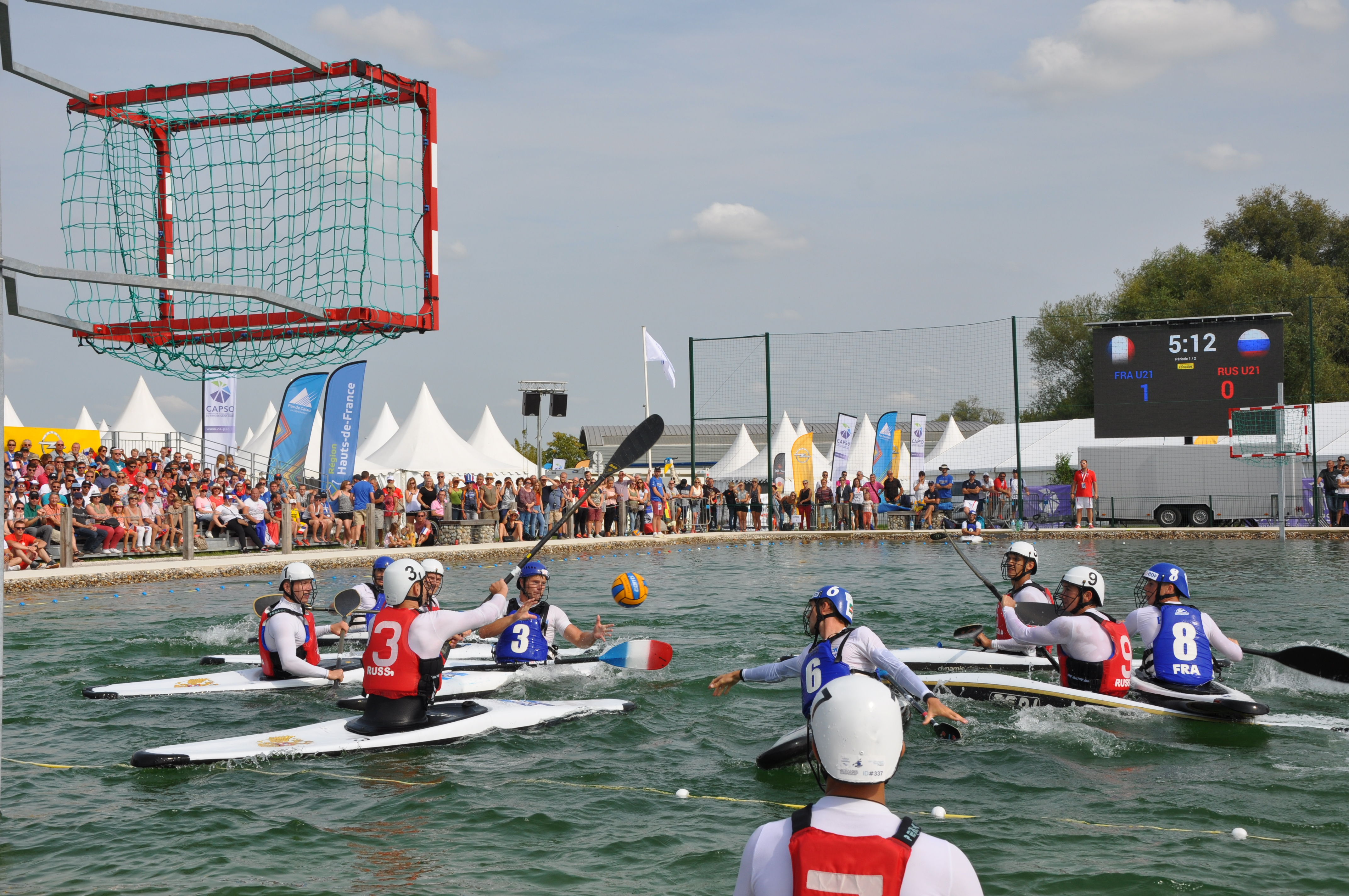 Match FRA-RUS Men U21 Canoe Polo 2017